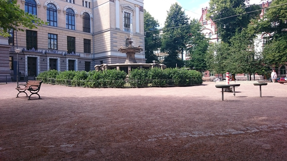 Säätytalon puisto heinäkuussa 2016.